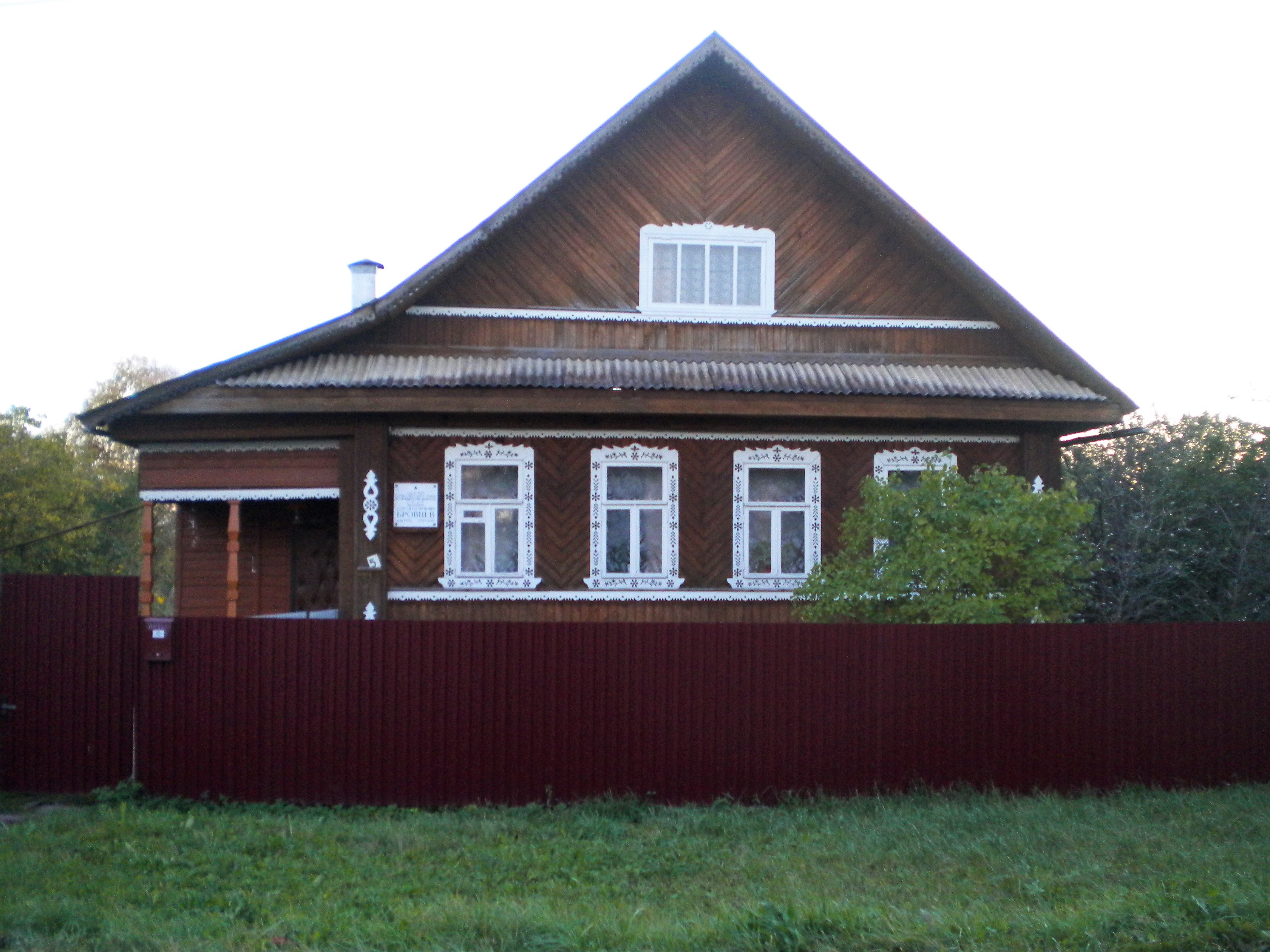 Здание, в котором жил Герой Советского Союза, заслуженный летчик-испытатель СССР С.Г. Бровцев: улица Бровцева, 5, Спирово, Спировский район, Тверская область